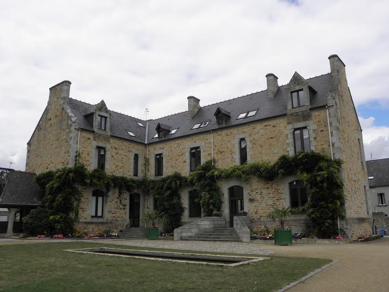 Hôtel-de-Ville de La Guerche-de-Bretagne (35) côté jardins.